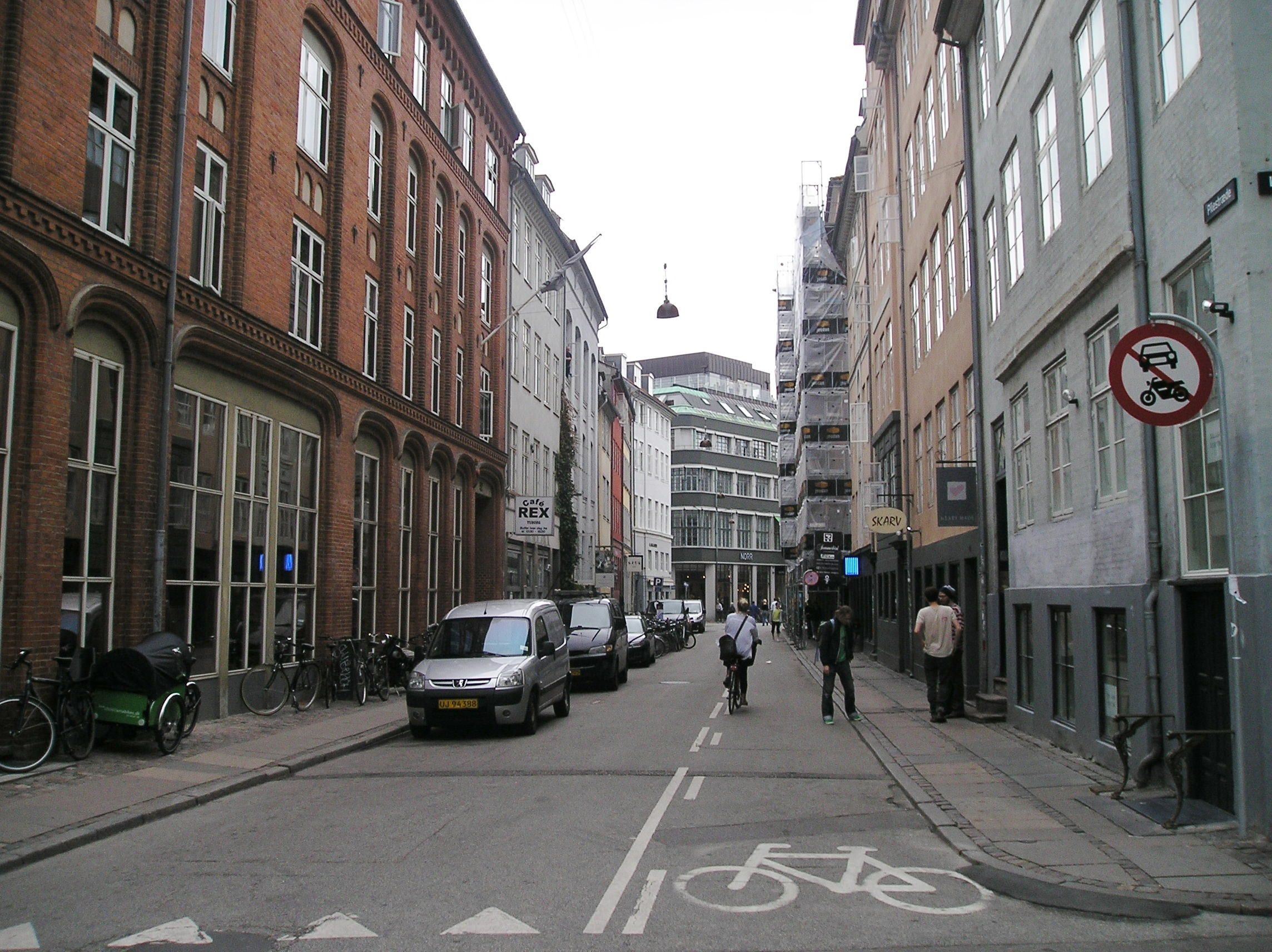 The street Pilestræde in Copenhagen.